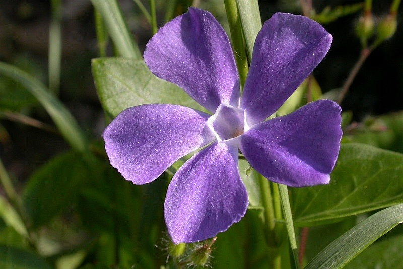 Vinca major, Gradignan, Gironde, France, jardin